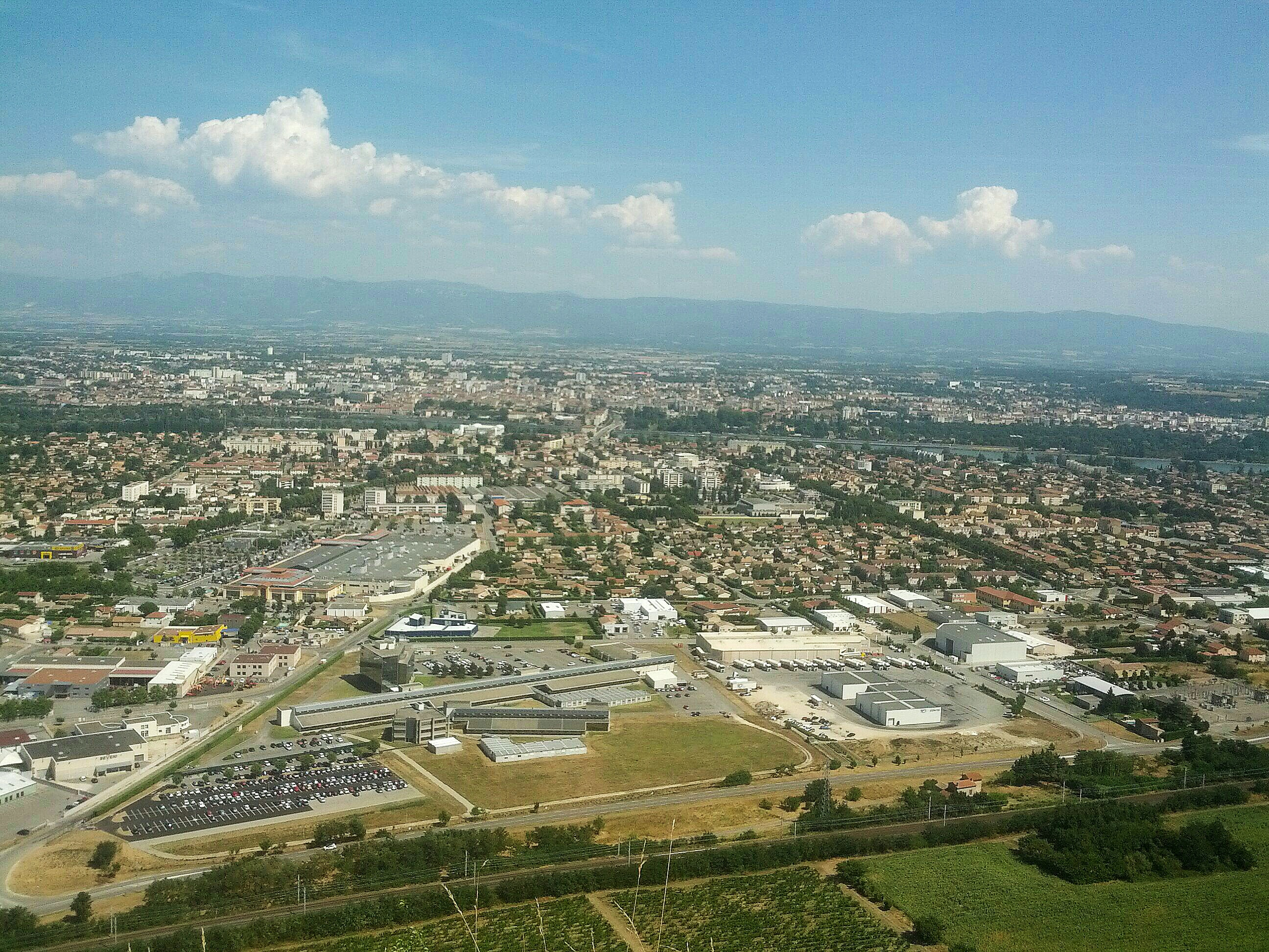 La ville de Valence (Drôme) depuis la colline de Crussol (juillet 2015)